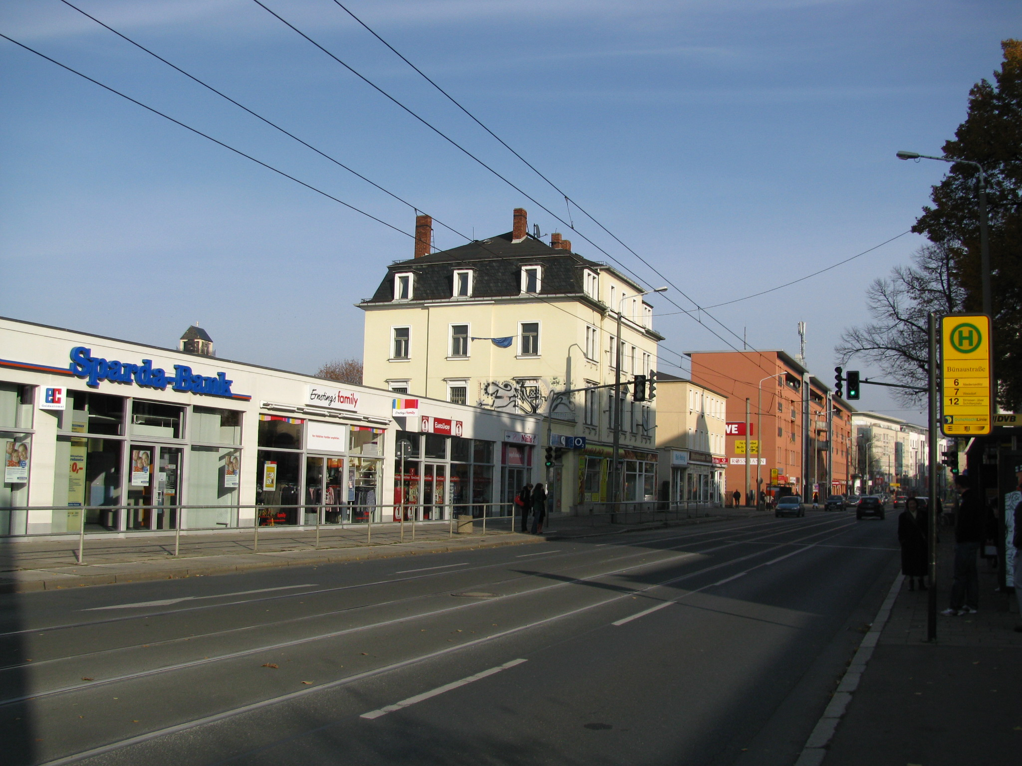 Dresden: Kesselsdorfer Straße, unterhalb der Wernerstraße. Im Hintergrund die Spitze der Friedenskirche.